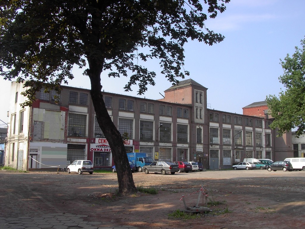 Fabryka Pafino przy ul. Dąbrowskiego 17/21 w Łodzi